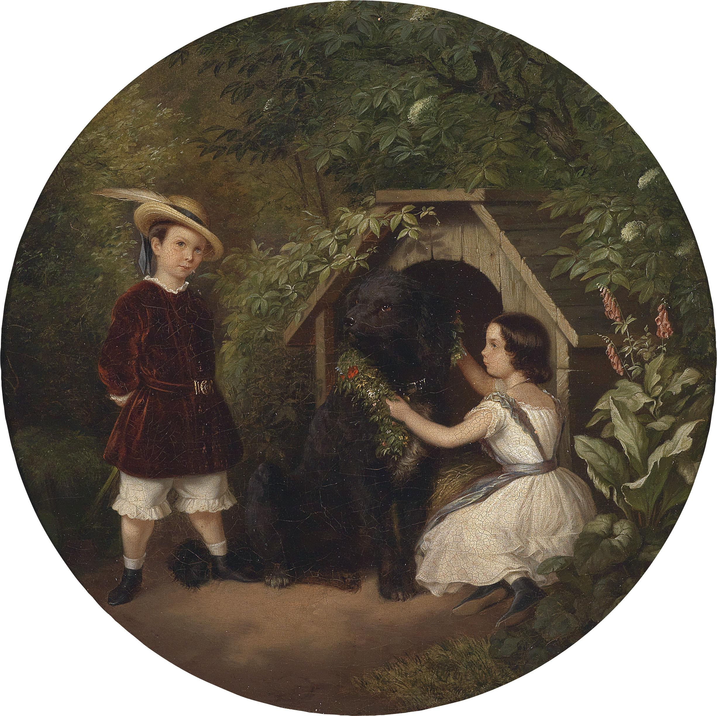 Bildnis Felix (1849-1909) und Doris (geb. 1848) Seidel mit ihrem treuen Gefährten, Öl auf Leinwand, 30,5 x 30,5 cm. Laut Auktionshaus aus dem Umkreis des Julius Friedrich Ludwig Runge (1843-1922).